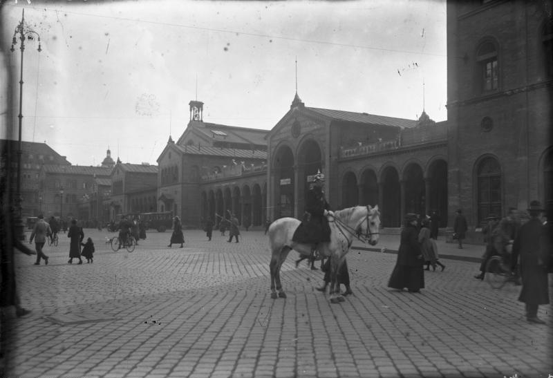 Der Hauptbahnhof in München.